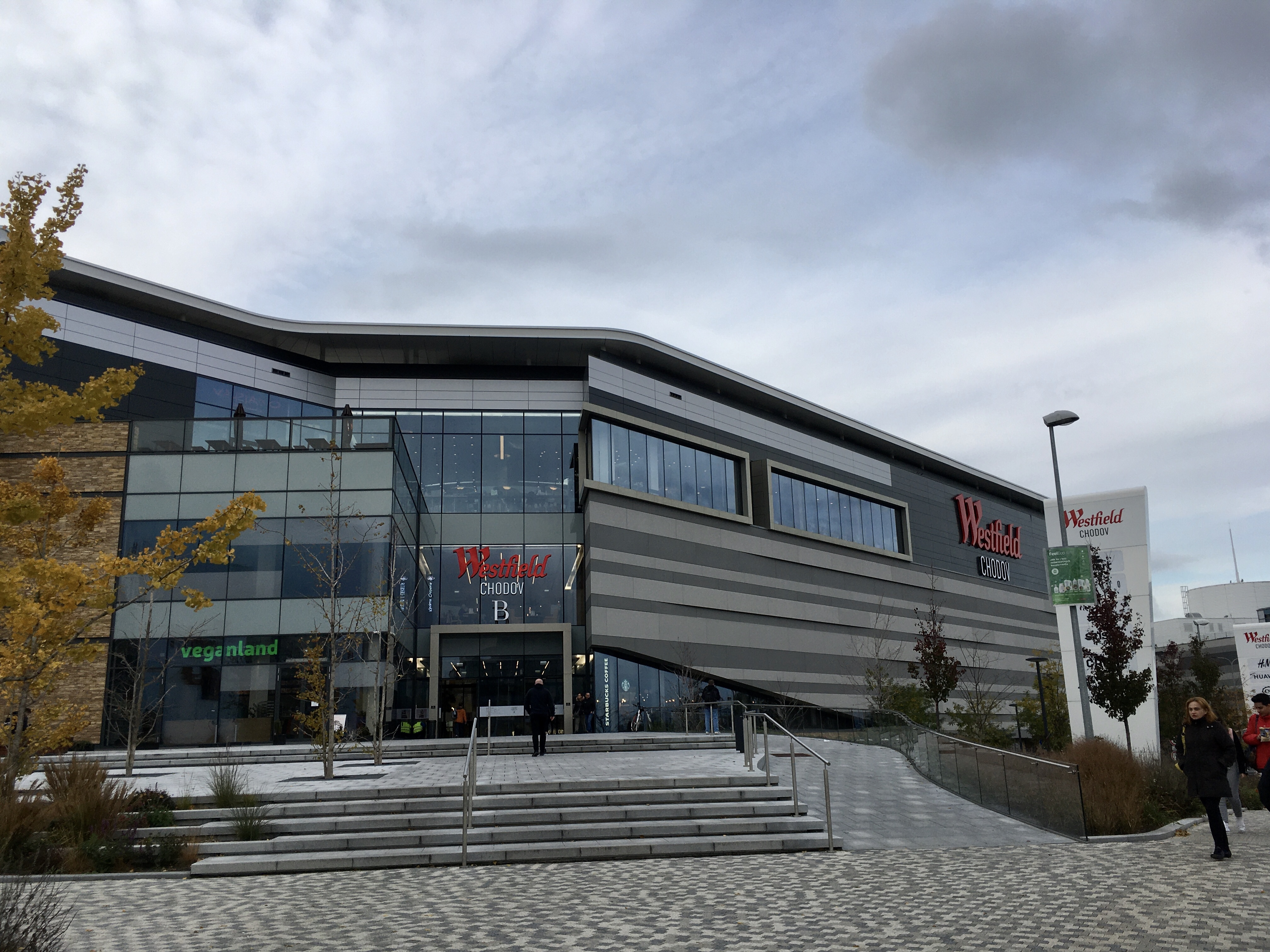 Vchod B